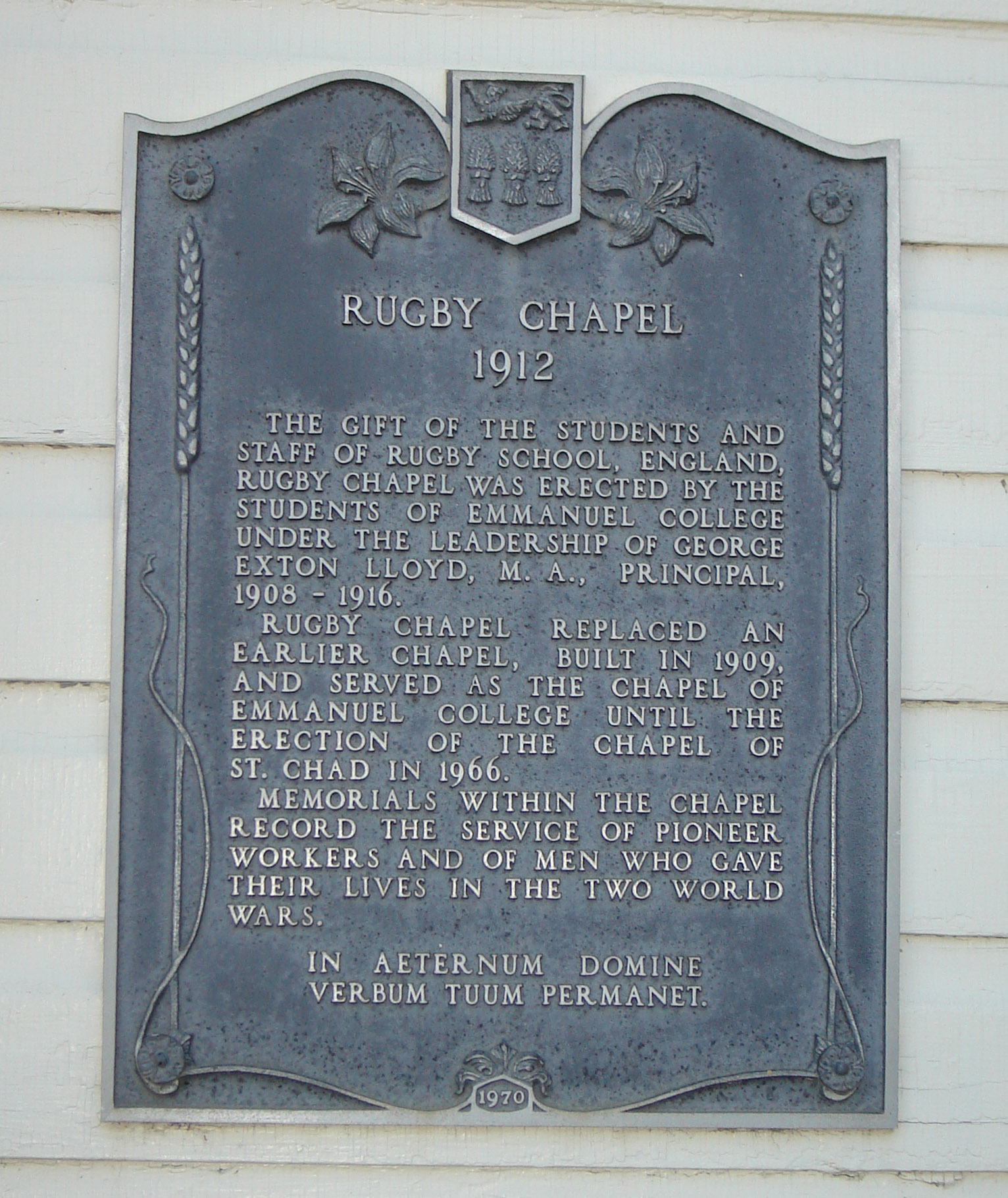 Wikipedia:Rugby Chapel U of S Saskatoon Sasktchewan Canada